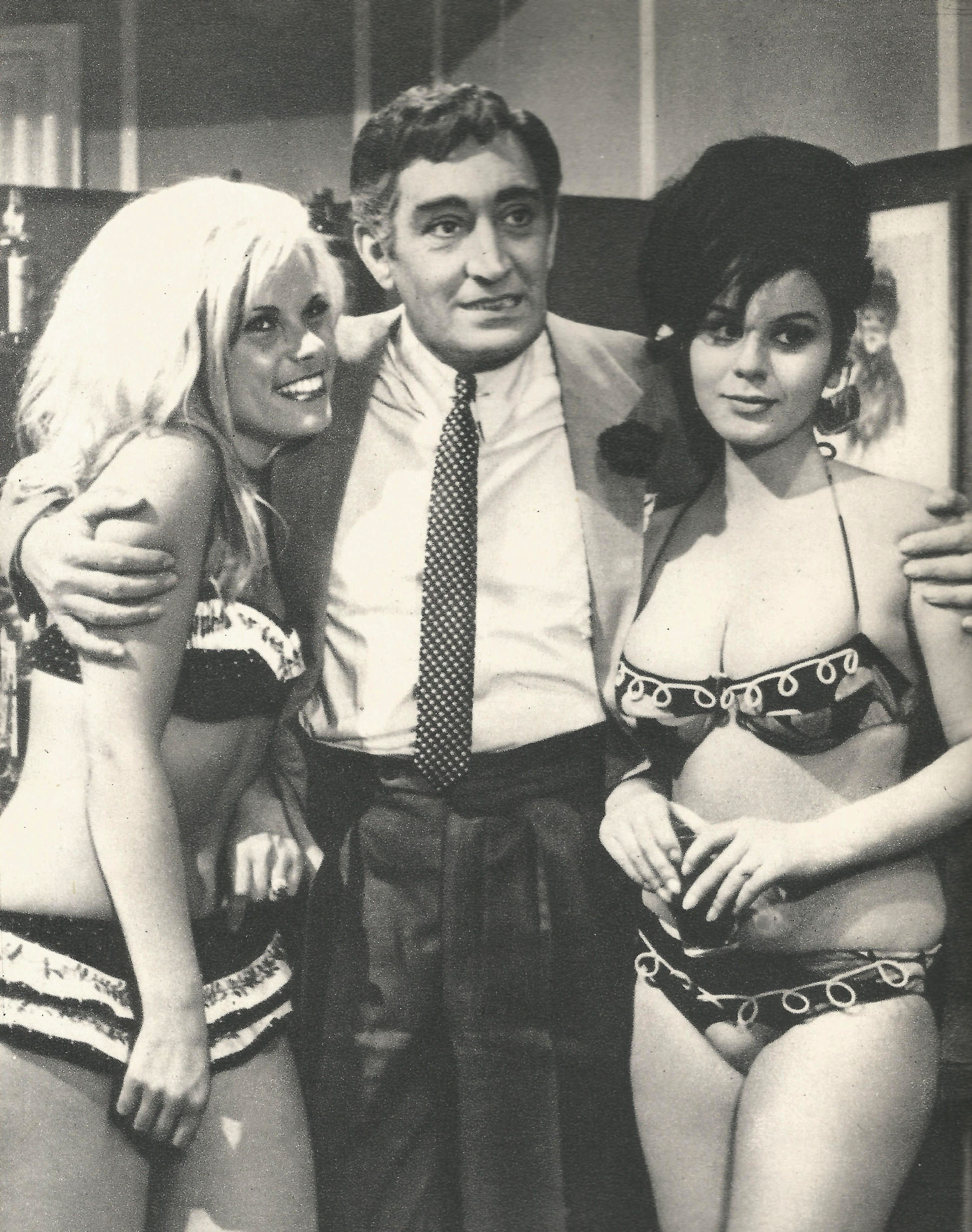 Arturo Dominici nel film I due evasi di Sing Sing